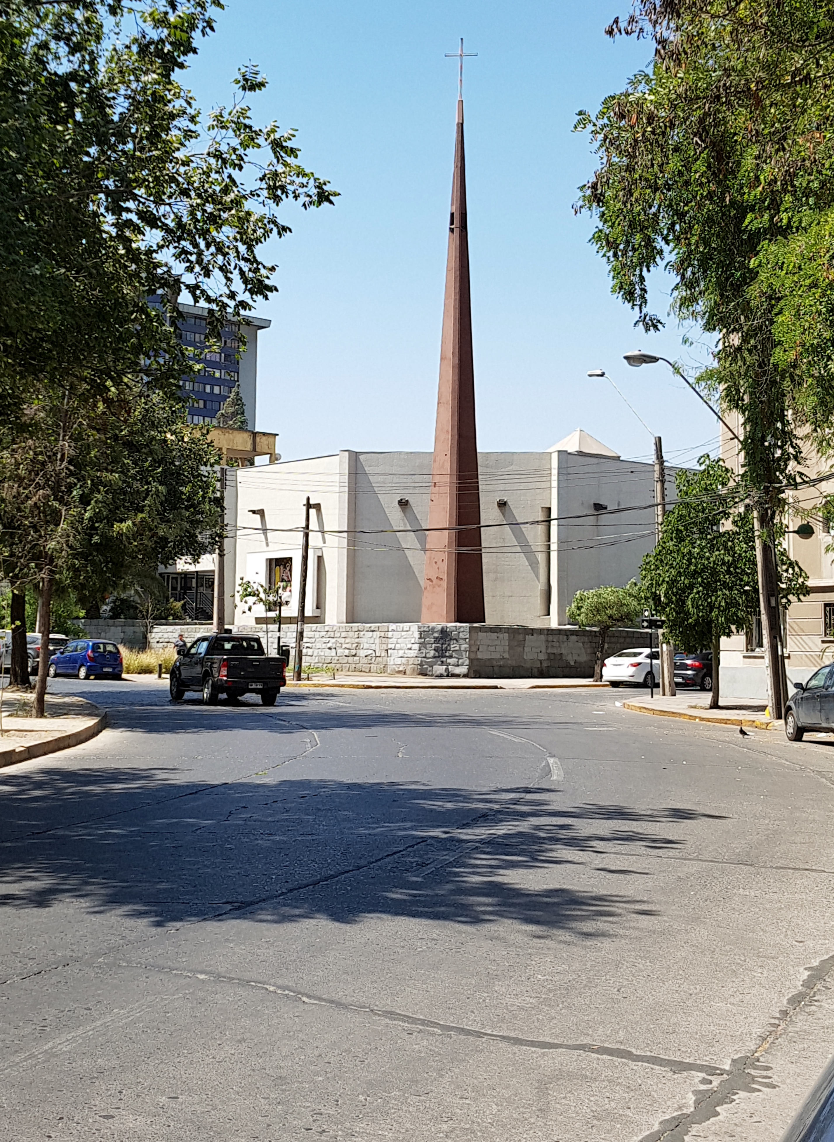 La iglesia Nuestra Señora de Pompeya (conocida también como parroquia italiana o de los inmigrantes), Bustamante esquina Jofré; comuna de Providencia, Santiago de Chile.